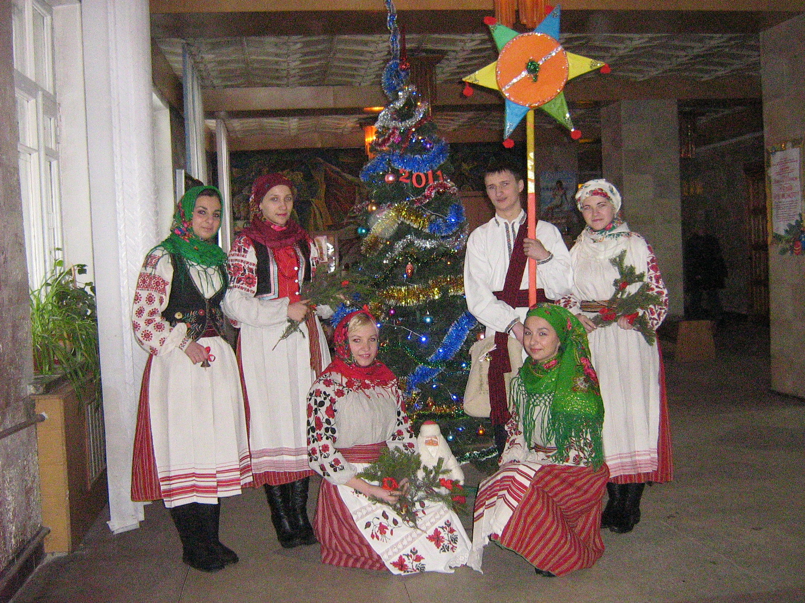 Колядування 2010 року